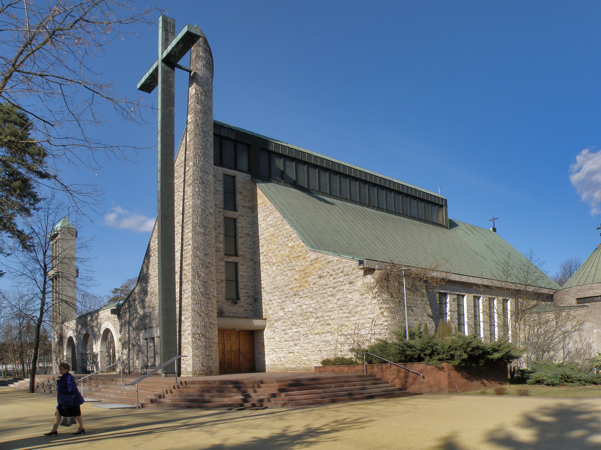 Parafia Matki Bożej Królowej Polski w Warszawie - Aninie, ul. Rzeźbiarska 46, 04-620 Warszawa